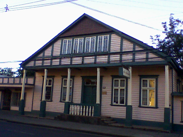 Casa de Federico Stückrath: Casona Alemana estilo Múnchen, con riostras y verticales a la vista aun pertenece a familia que la construyó y tiene un local de alta artesanía.